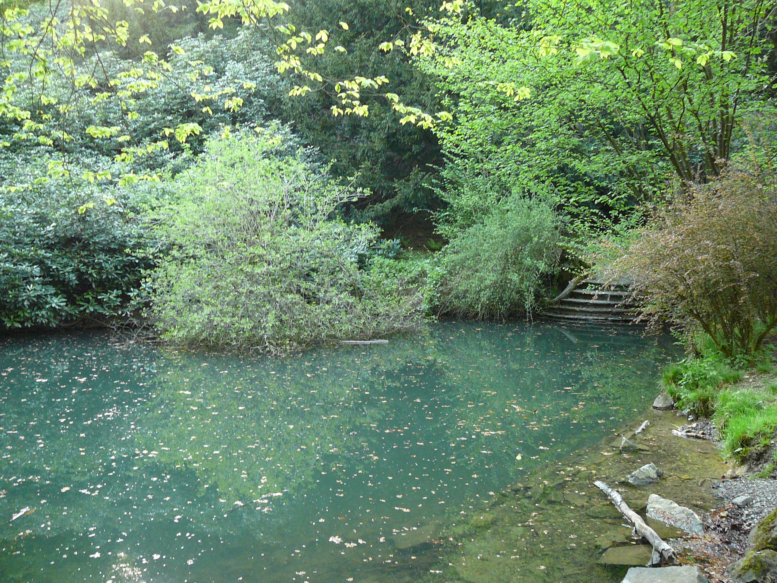 Adolf-Vorwerk-Straße, Wuppertal